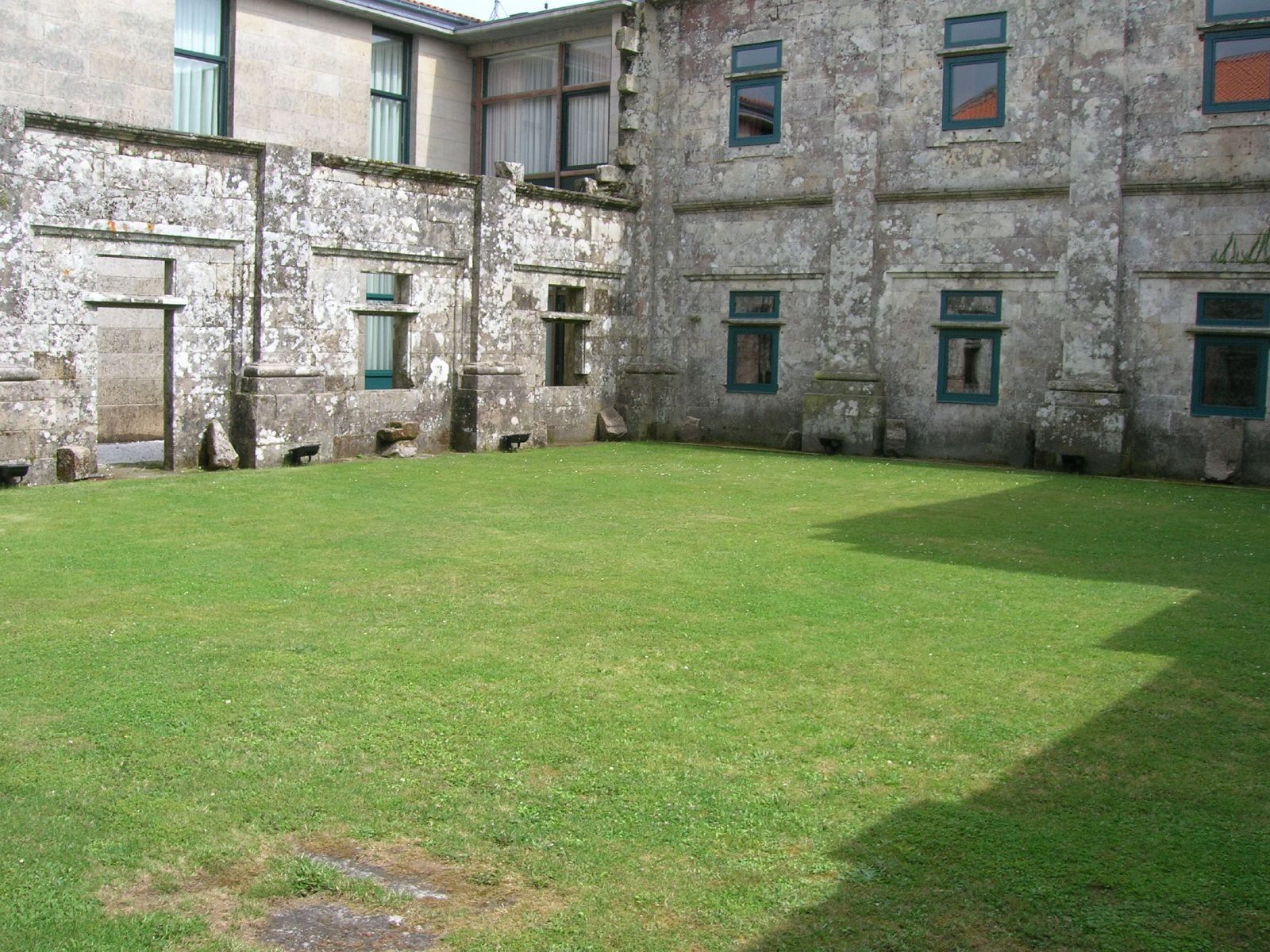 Mosteiro de Santa María de Aciveiro. Restos do Claustro das Procesiones. - Forcarei - PontevedraMonasterio de Santa María de Acibeiro